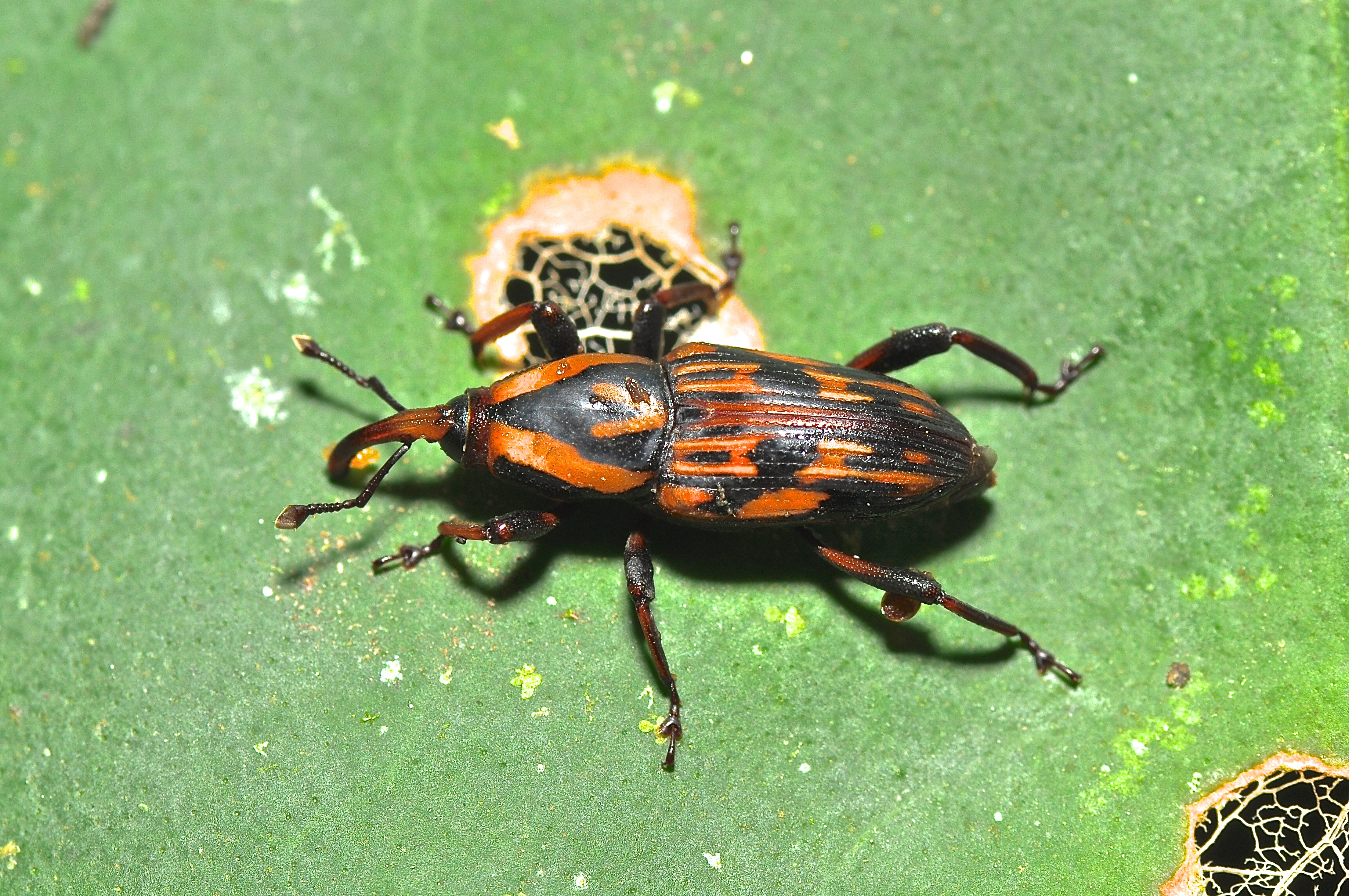 Metamasius sp?